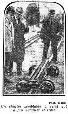 Déraillement de Montereau du 31 mai 1930, Seine-et-Marne, France. Photo d'un lorry publiée par Le Matin.